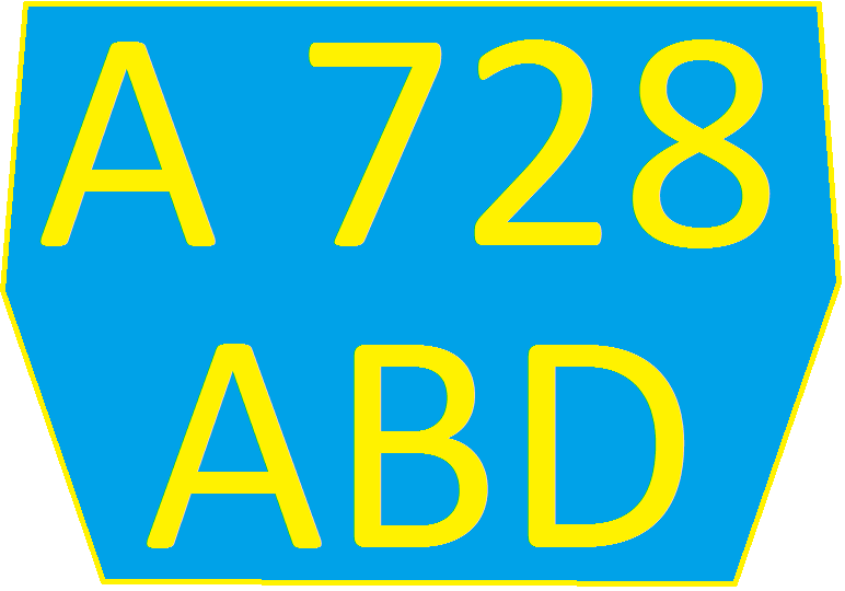 Тракторный номер Казахстана, скошенный вариант